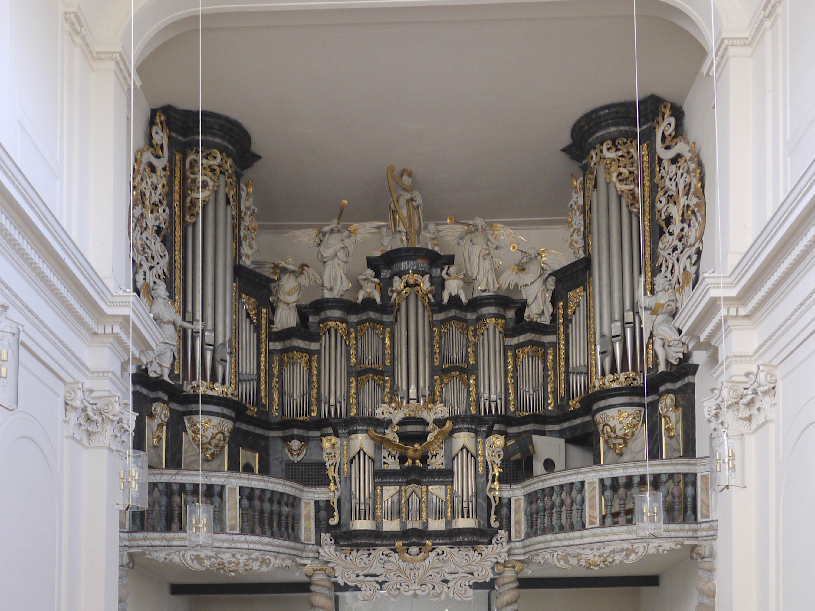 Salzgitter-Ringelheim, Kath. Kirche St. Abdon und Sennen, Blick auf die Orgel